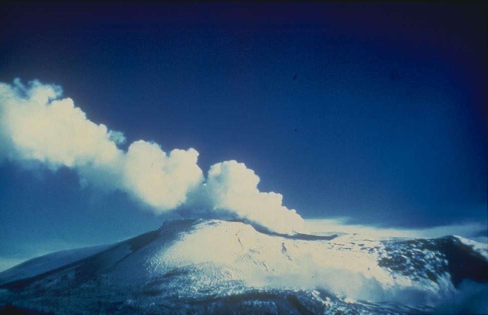 Nevado del Ruiz volcano in Colombia